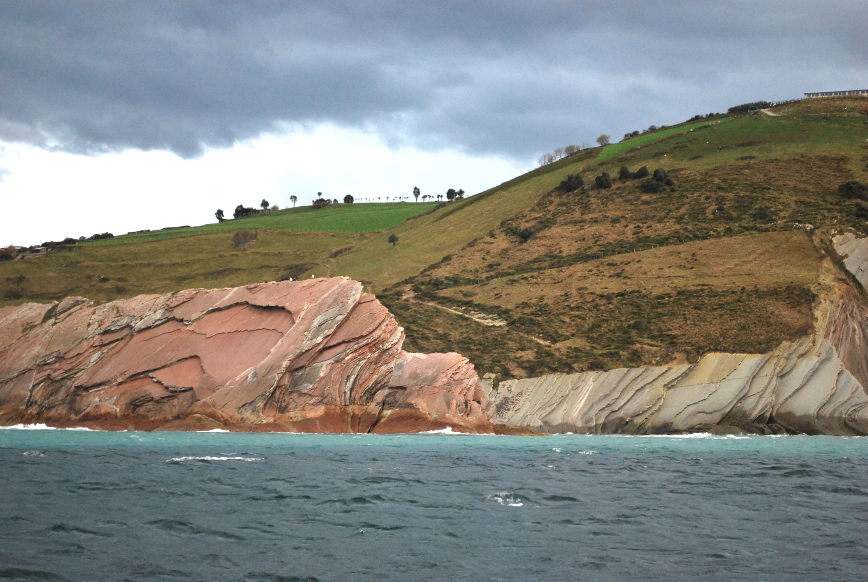 Flysch à Zumaia (Guipuscoa).